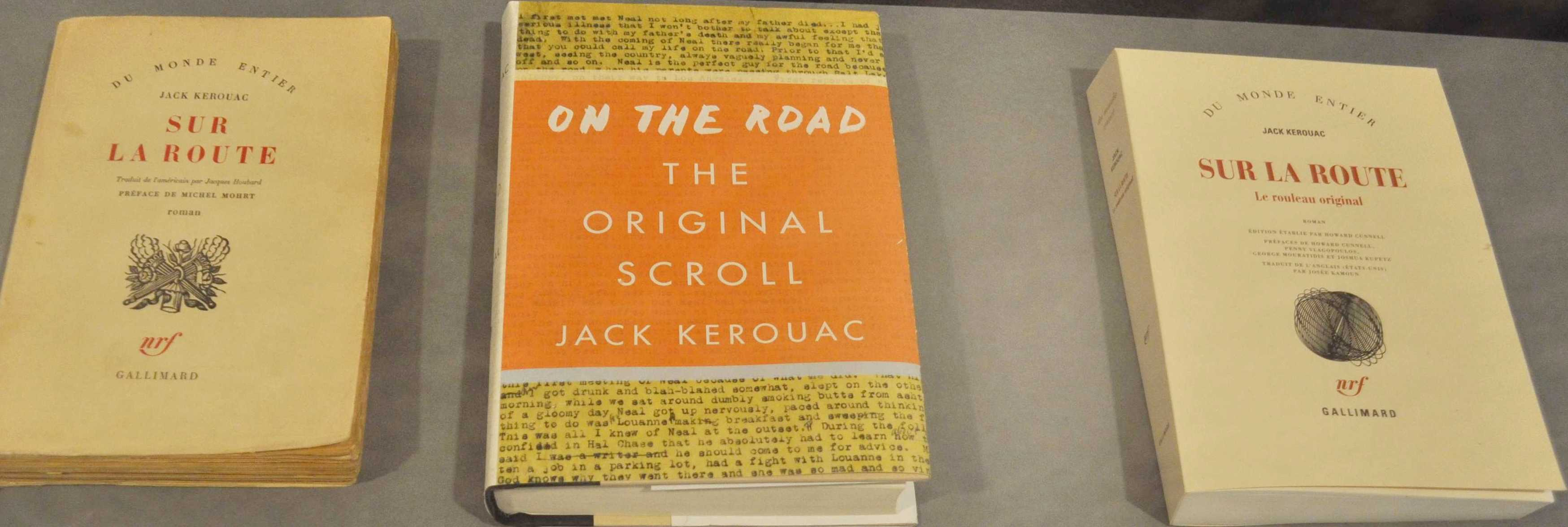 Trois éditions de Sur la route de Jack Kerouac : édition originale par Gallimard de 1968 (à gauche), édition américaine Original Scroll (manuscrit original, non édulcoré) par Viking Press, 2007 (au milieu) et réédition du manuscrit original par Gallimard, 2012 (à droite). Exposition "Sur la route deJack Kerouac : L'épopée, de l'écrit à l'écran" (16 mai - 19 août 2012) au Musée des lettres et manuscrits de Paris